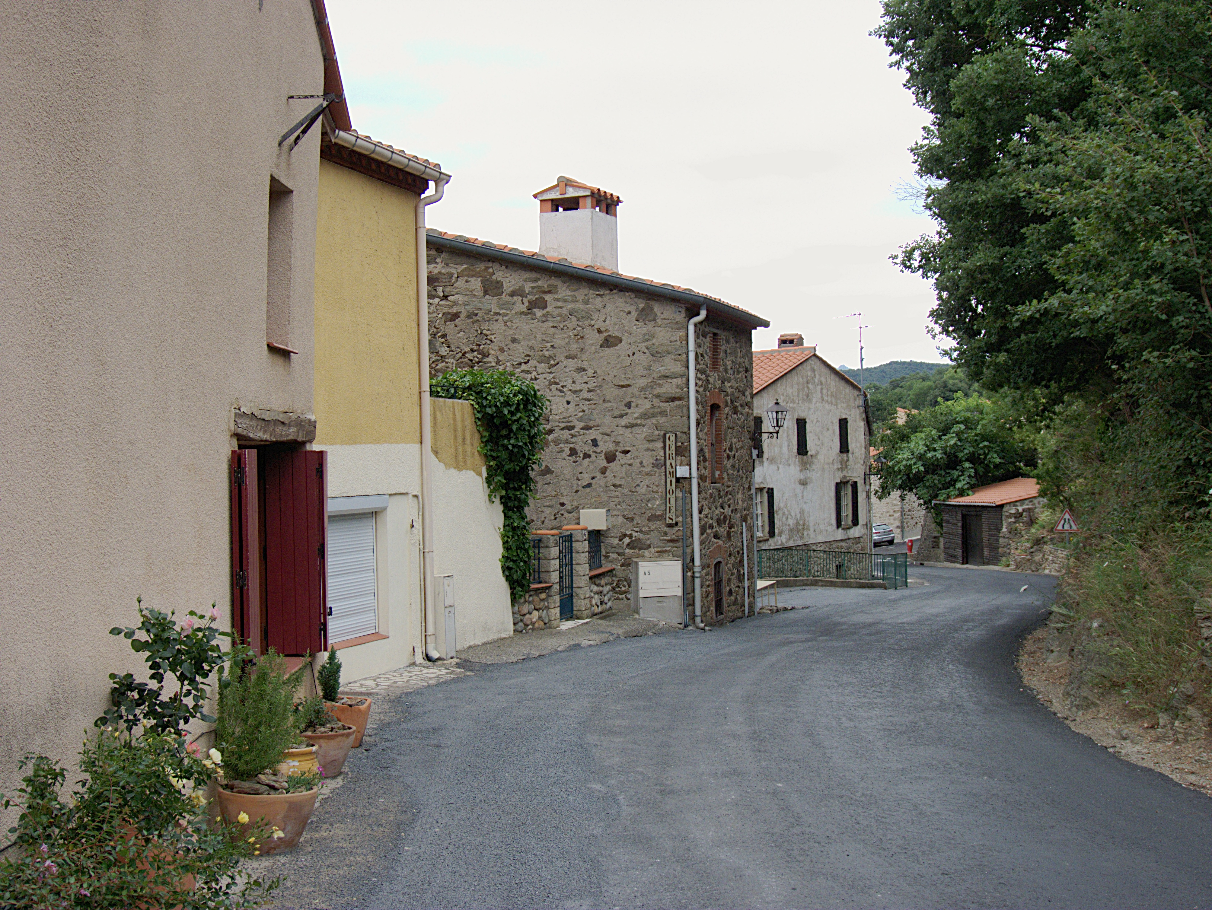 Grande rue, Taulis (Pyrénées-Orientales, Languedoc-Roussillon, France)